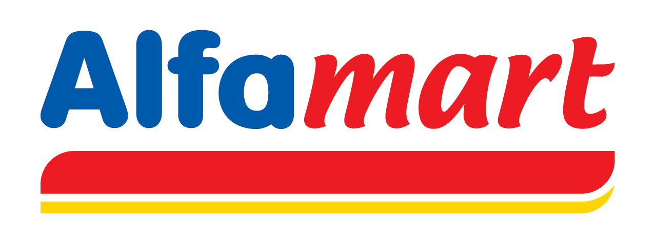 Logo Alfamart terbaru